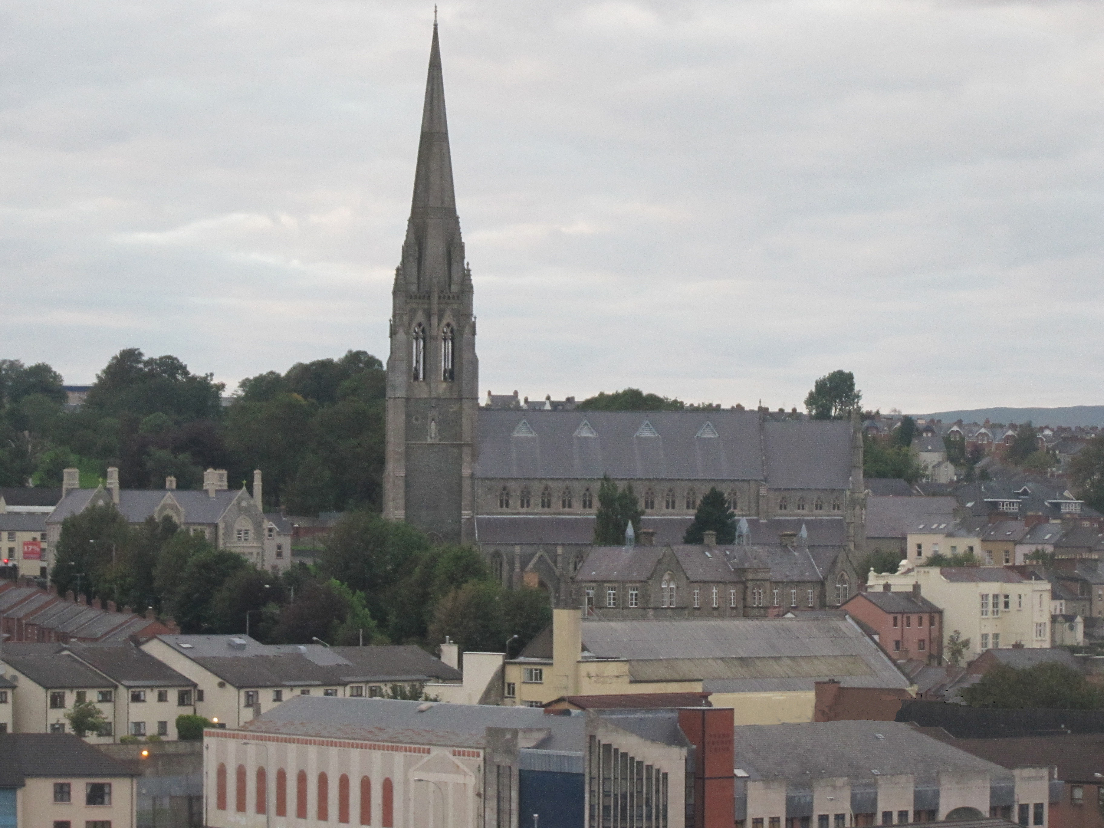 St eugene's Cathedral by Paride